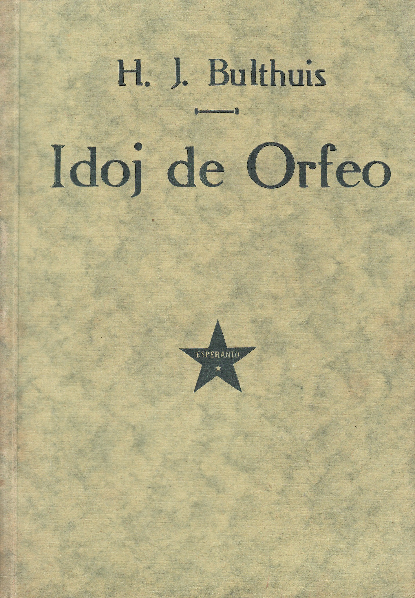 Idoj de Orfeo